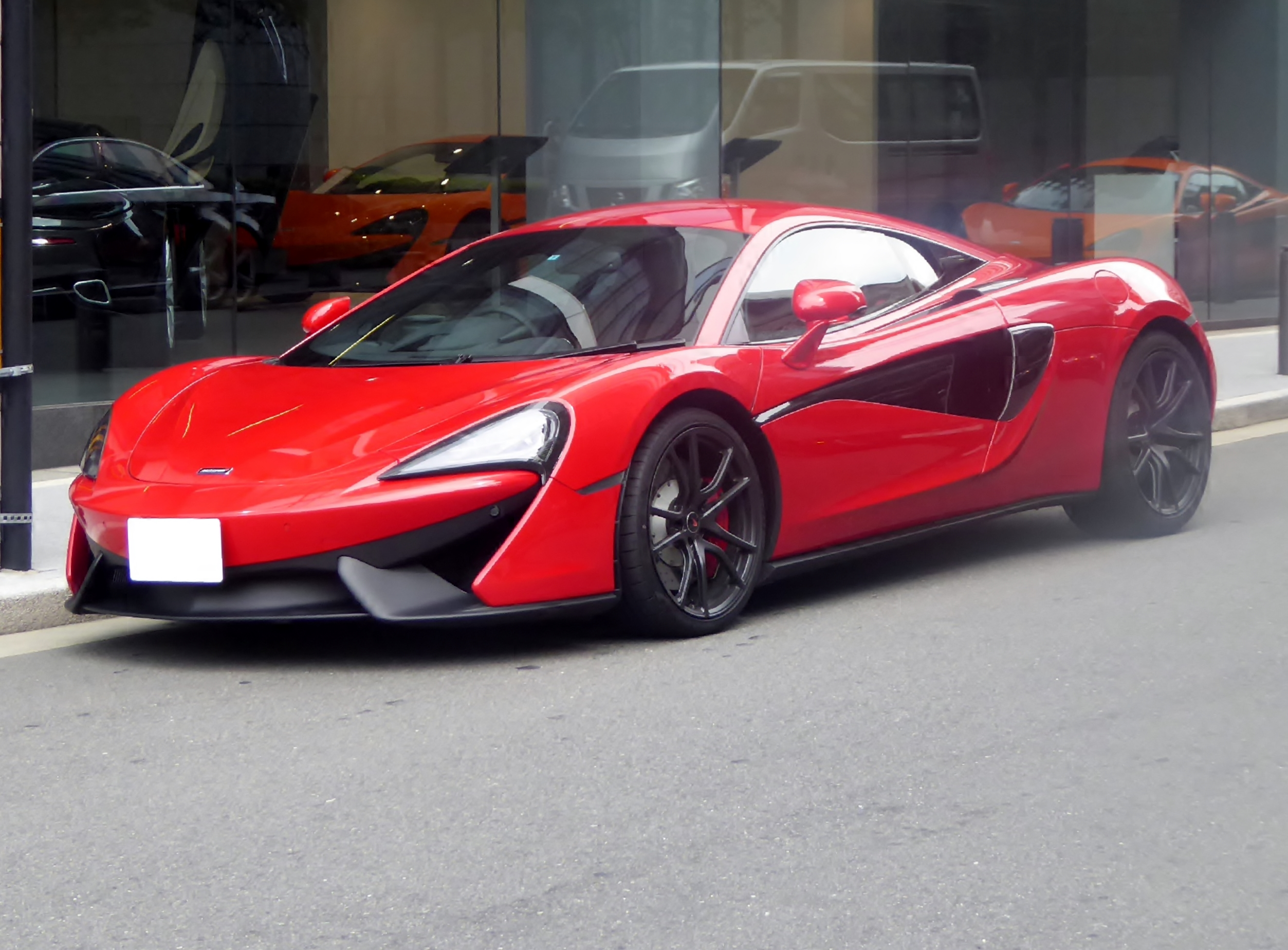 M838TE型マクラーレン・540Cをフロントから撮影。